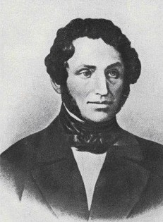 Martin Alexander Přibyl (1803 - 1871), Český kněz, národní buditel, archivář, archeolog a básník.